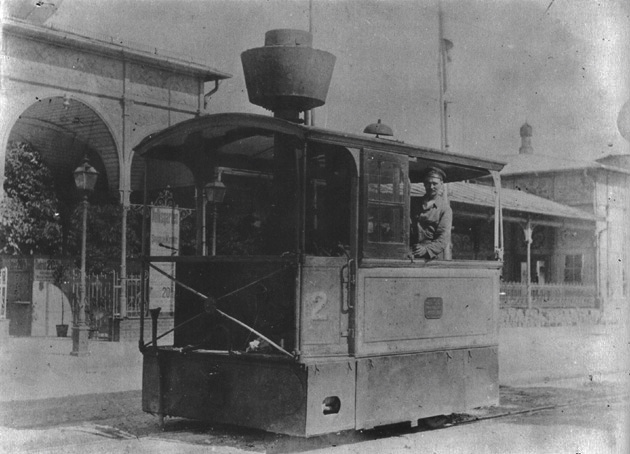 München, Dampftrambahn vor dem Volksgarten Nymphenburg